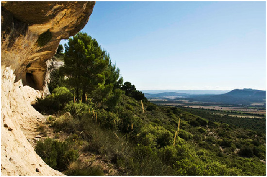 Abrigo de tortosilla (Ayuntamiento de Ayora)